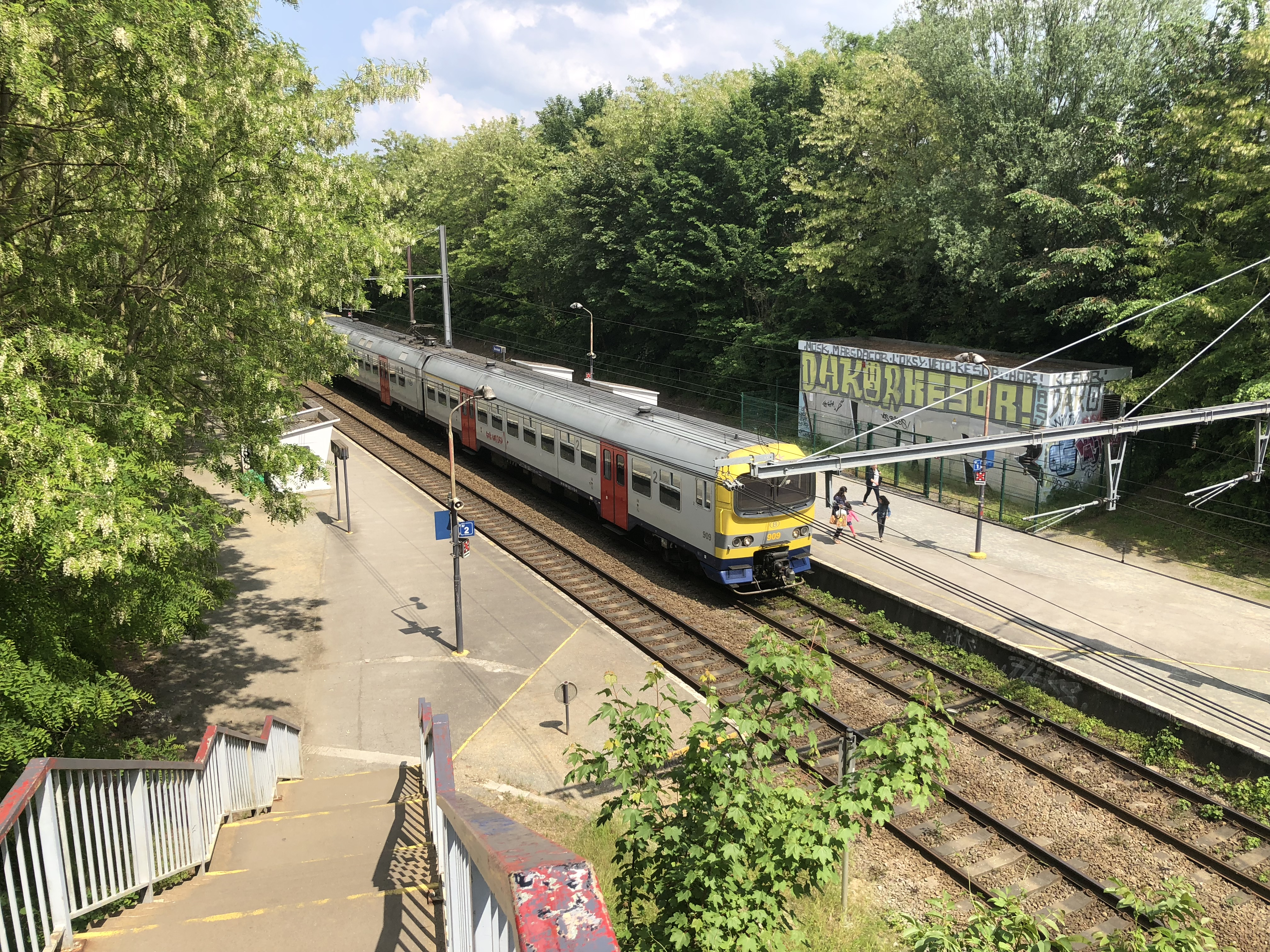 Boondaal station SNCB Class AM86 (new look)